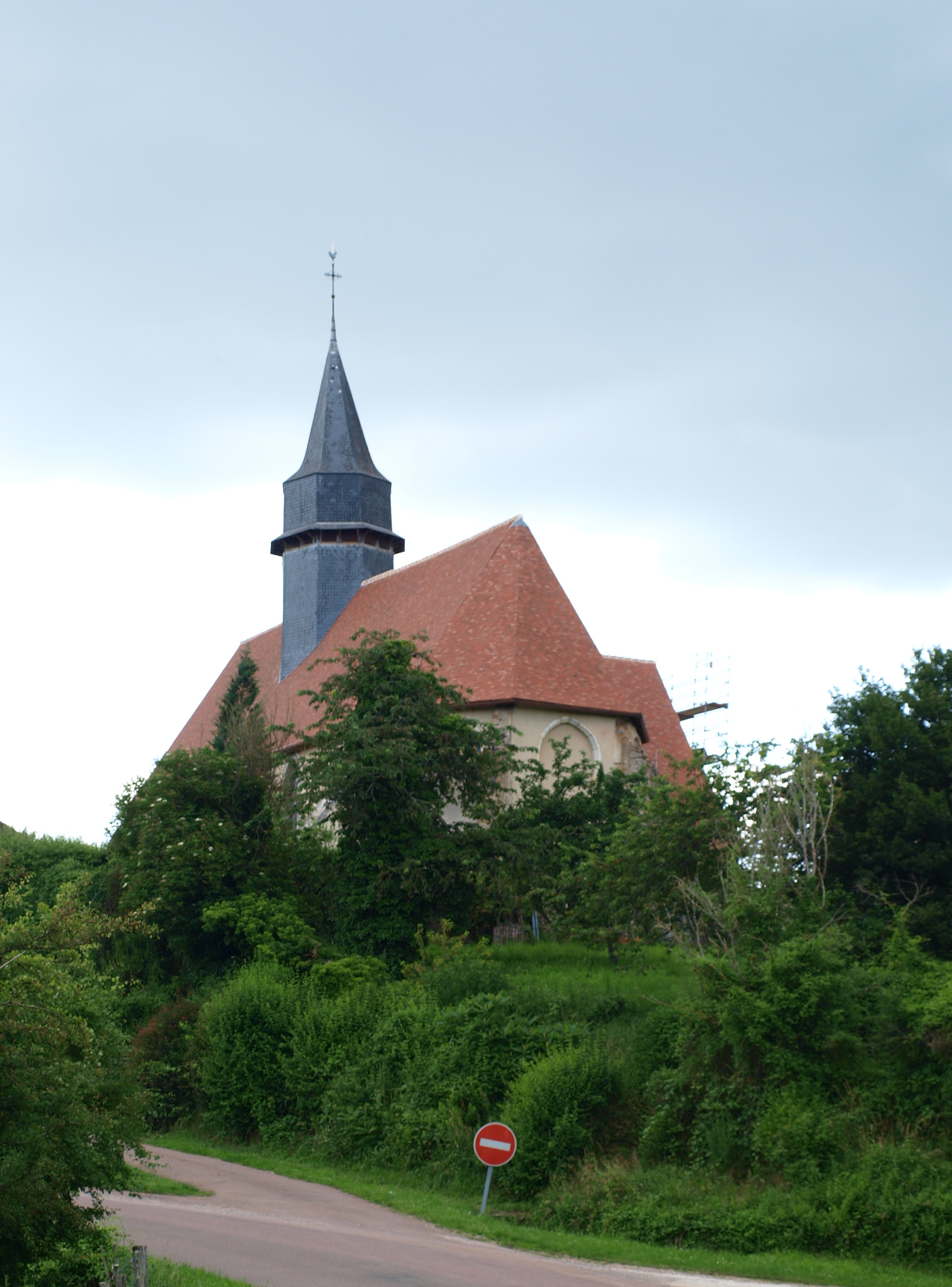 Sommecaise (Yonne, France) , l'église vue depuis le carrefour des D3 & D57